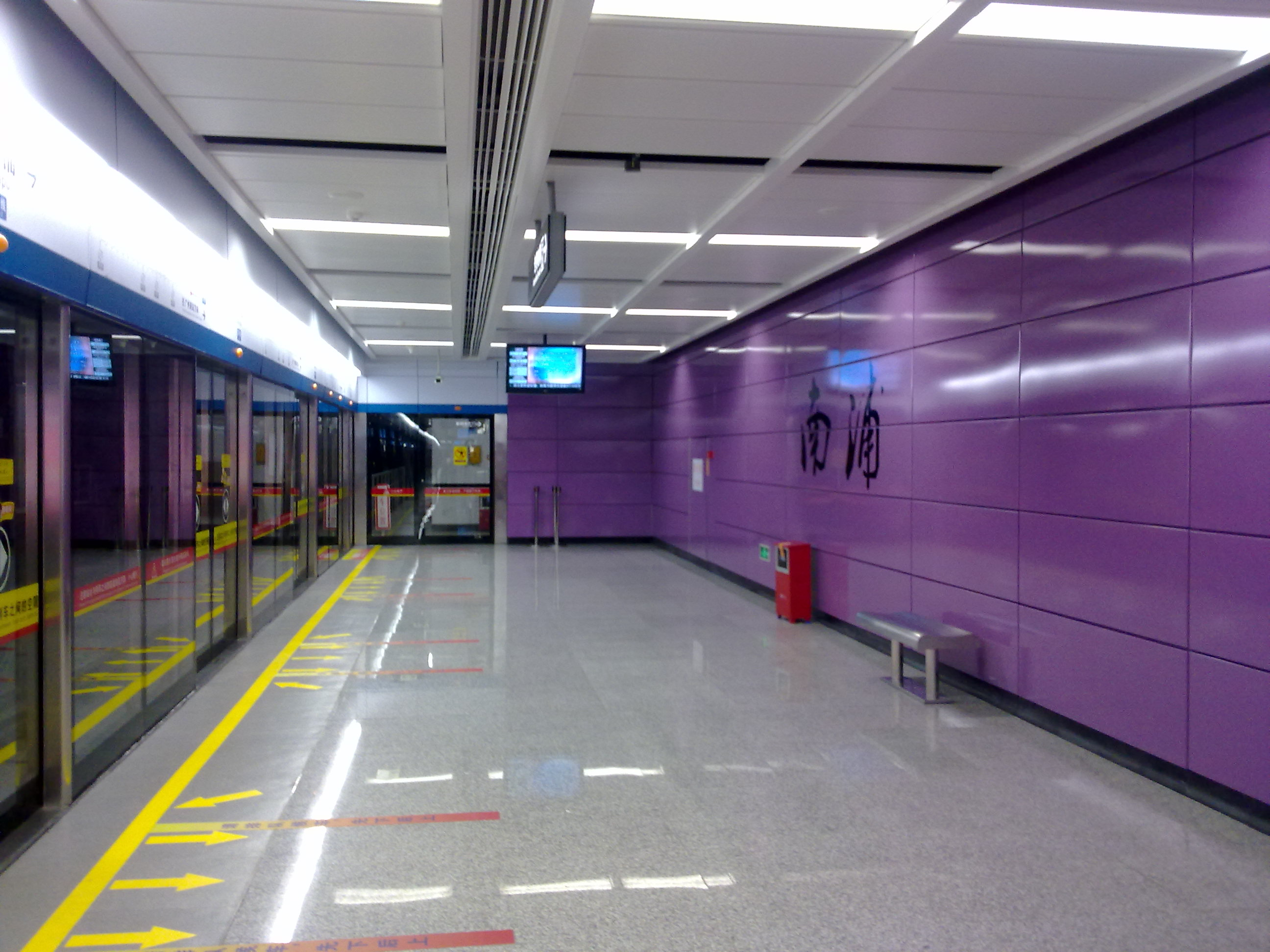 廣州地鐵南浦站站台